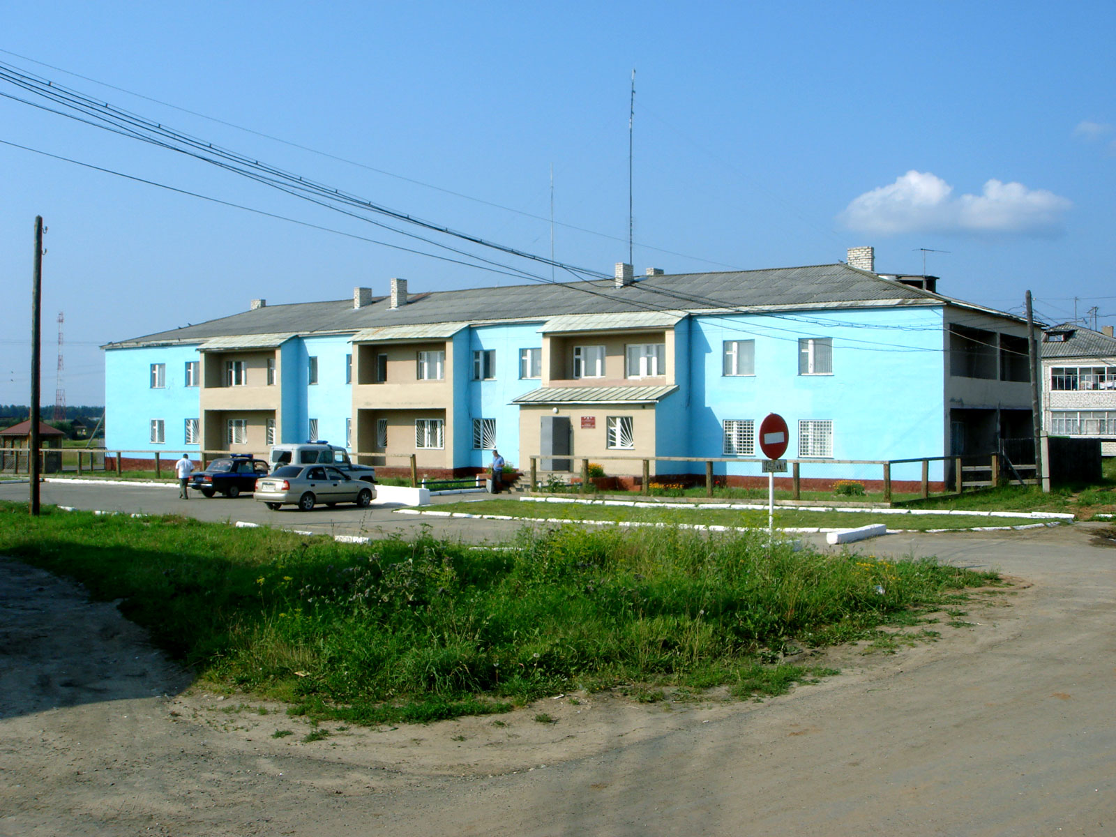 Отделение милиции в Варнавине, Нижегородская область, Россия.